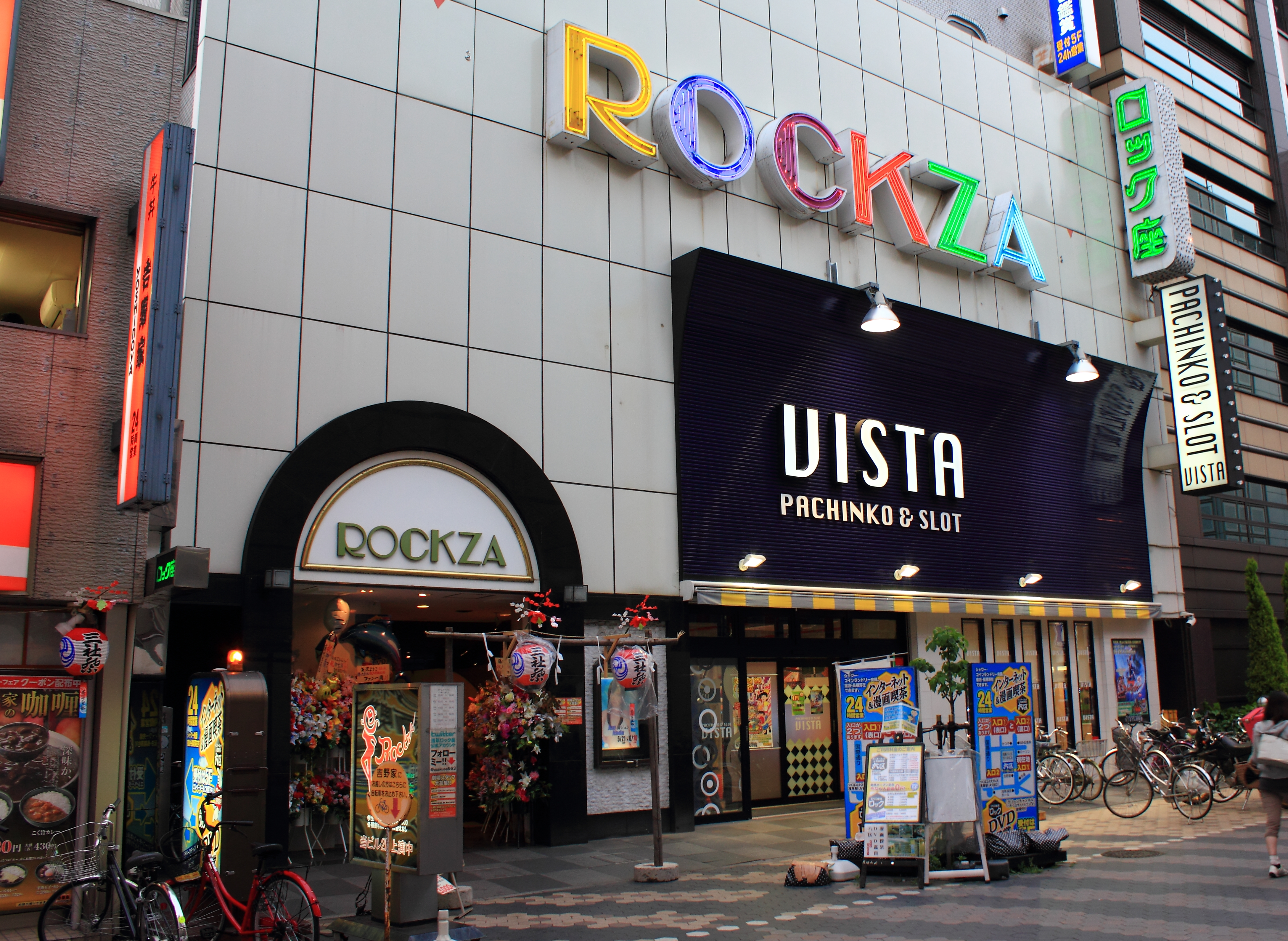 浅草ロック座。ストリップ劇場。東京都台東区。